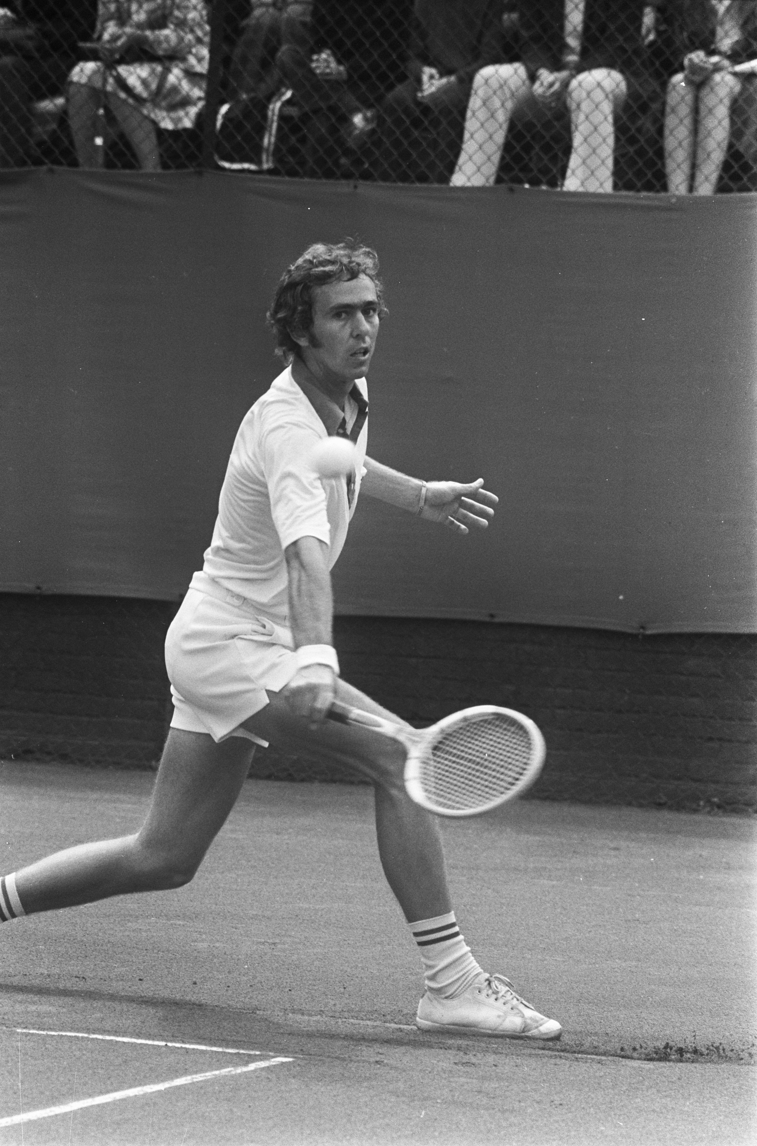 Collectie / Archief : Fotocollectie Anefo Reportage / Serie : [ onbekend ] Beschrijving : Internationale Tenniskampioenschappen Melkhuisje, de Australier G. Masters in aktie Datum : 20 juli 1973 Trefwoorden : kampioenschappen, tennis Persoonsnaam : G. Masters Instellingsnaam : Melkhuisje, 't Fotograaf : Verhoeff, Bert / Anefo Auteursrechthebbende : Nationaal Archief Materiaalsoort : Negatief (zwart/wit) Nummer archiefinventaris : bekijk toegang 2.24.01.05 Bestanddeelnummer : 926-5593